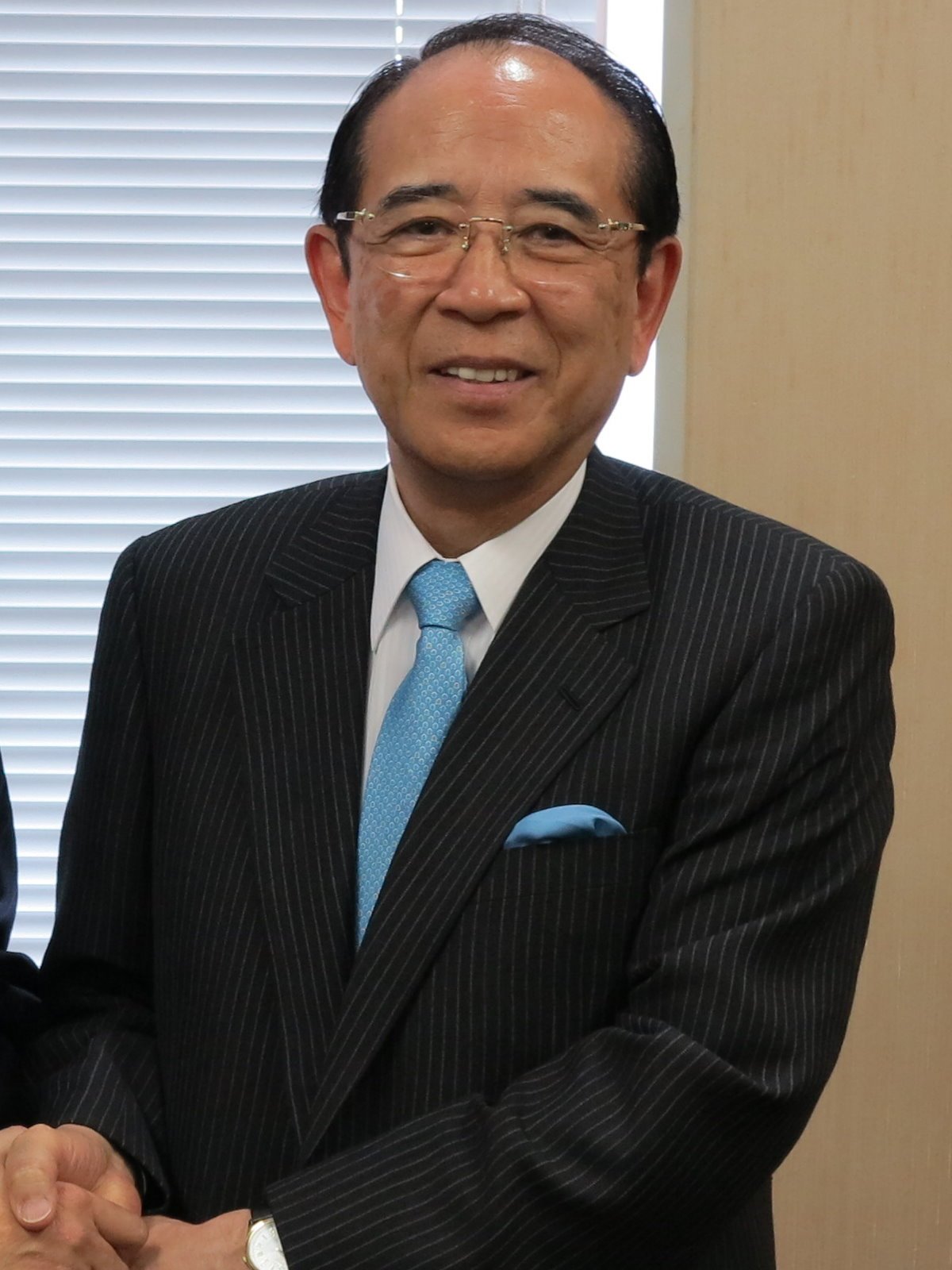 日本交流協會會長大橋光夫。